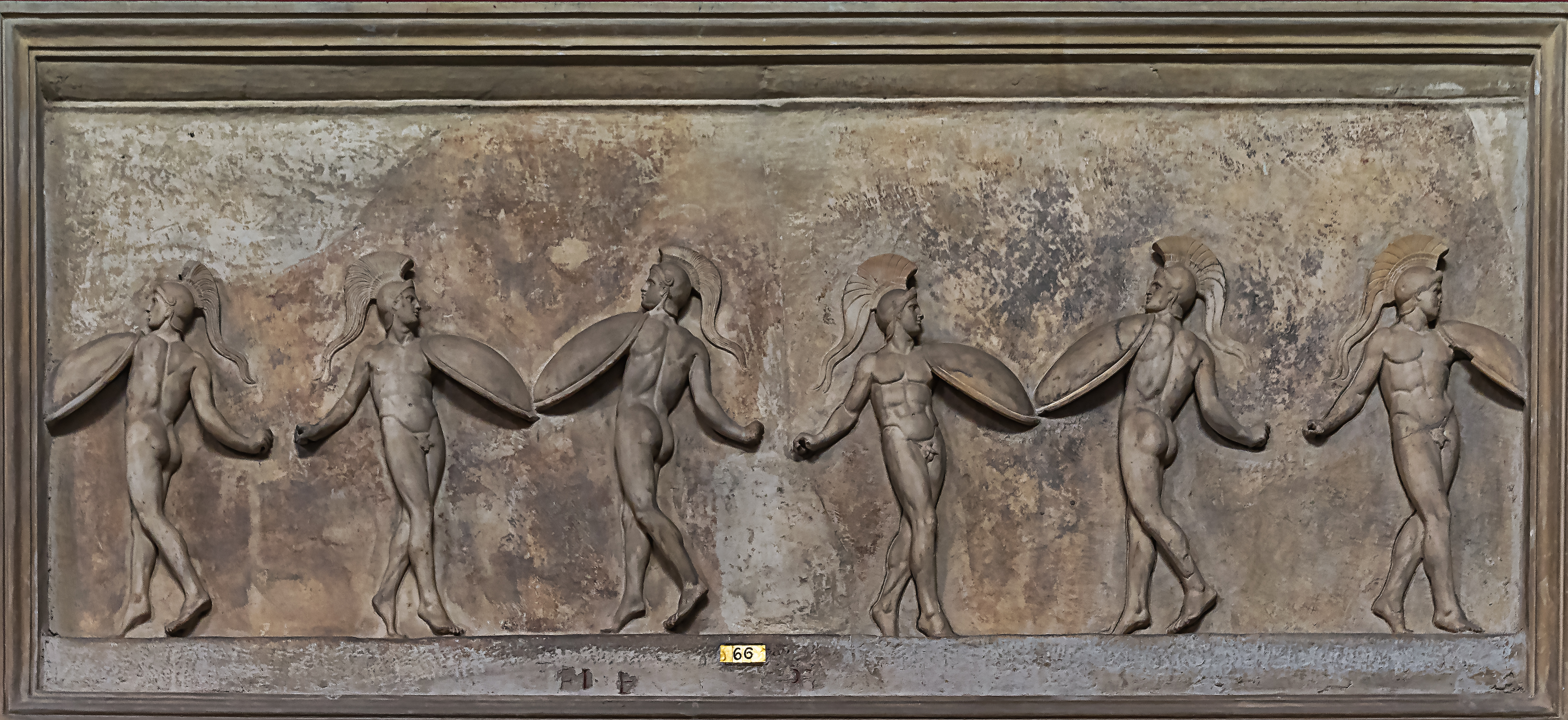 Die auf dem neoattischen Relief dargestellten Krieger führen einen Waffentanz aus. Dieser Tanz bestand darin, mit dem Schwert rhythmisch auf den Schild des nächsten Kriegers zu schlagen. Das Werk stammt aus der ersten Hälfte des 1. Jahrhunderts v. Chr. und ist die Kopie eines älteren, athenischen Reliefs. Ausgestellt in den Vatikanischen Museen (Inv. 321)